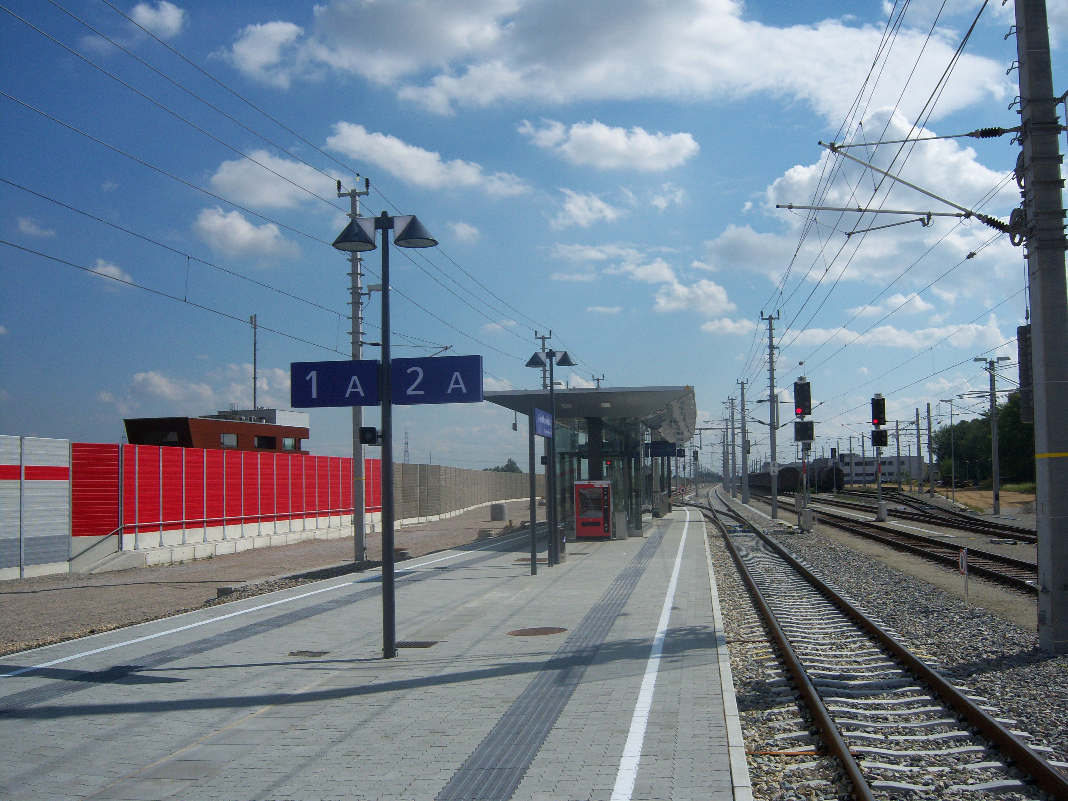 Bahnhof Wien Blumental